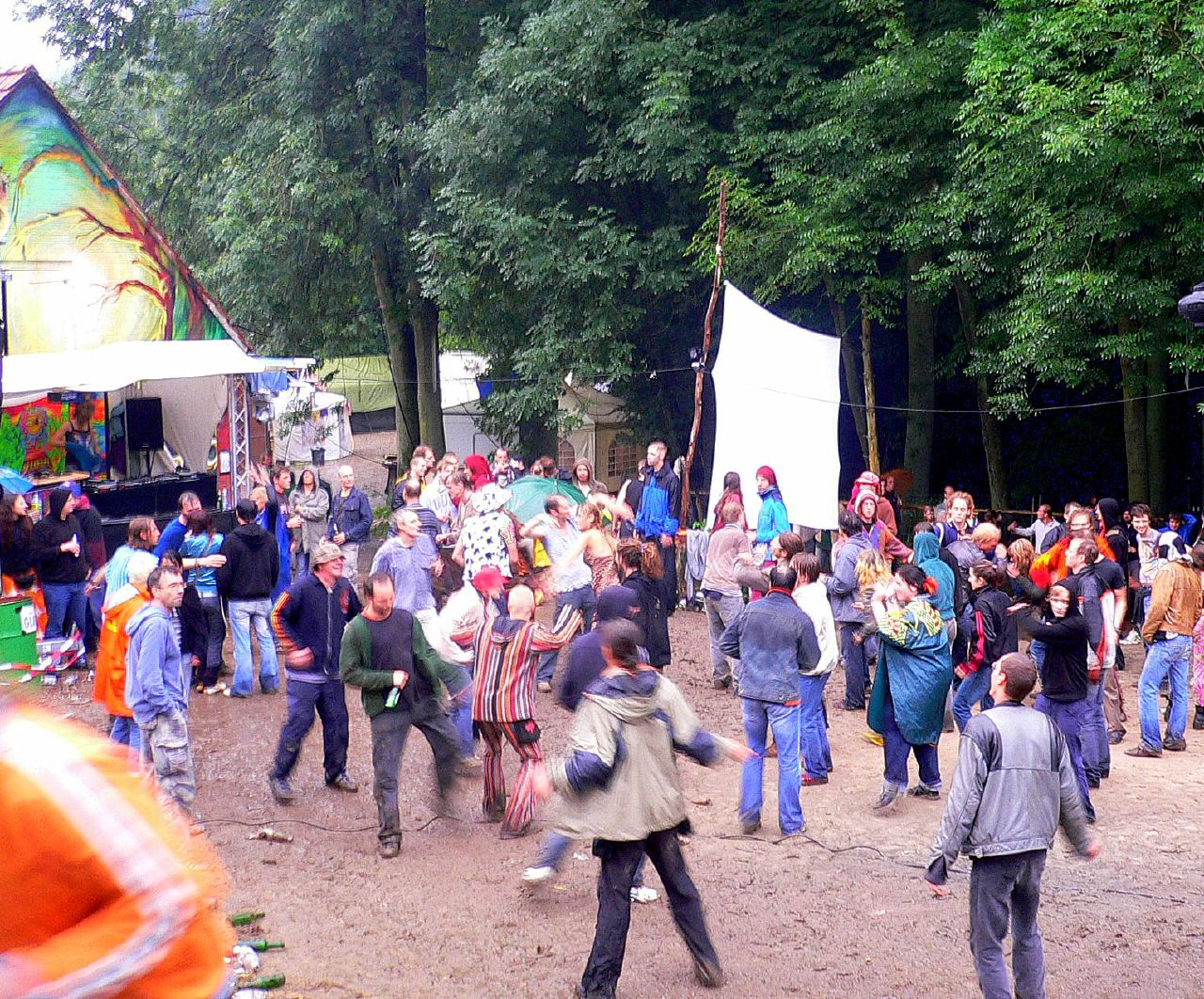 grooving at Waldfrieden Wonderland 2005